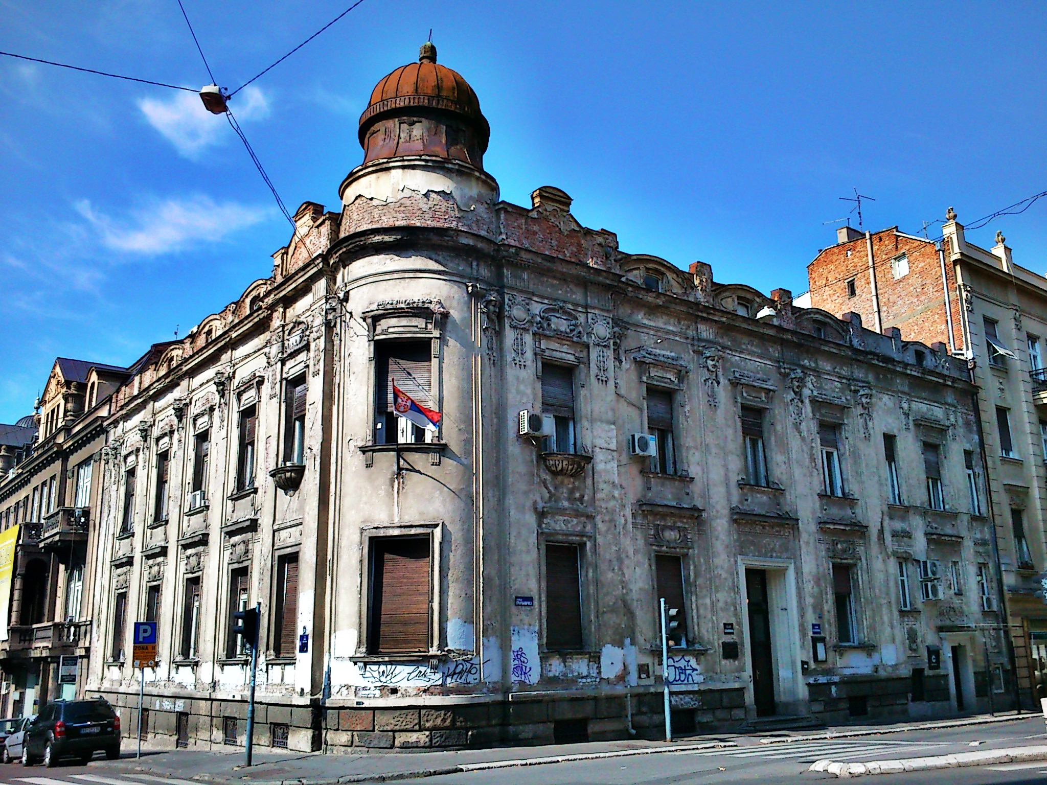 Кућа Милана А. Павловића